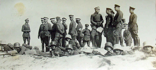 Duitse troepen in stelling tussen Westende en Lombardsijde op 10 juli 1917